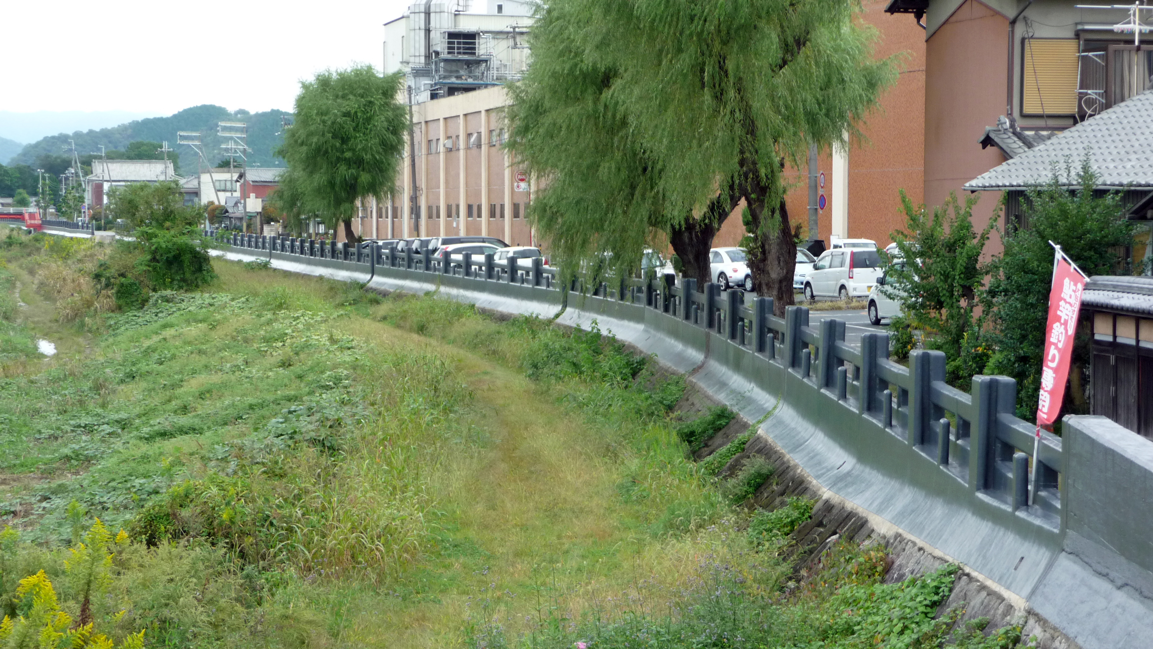 兵庫県たつの市内の揖保川沿いにある畳堤